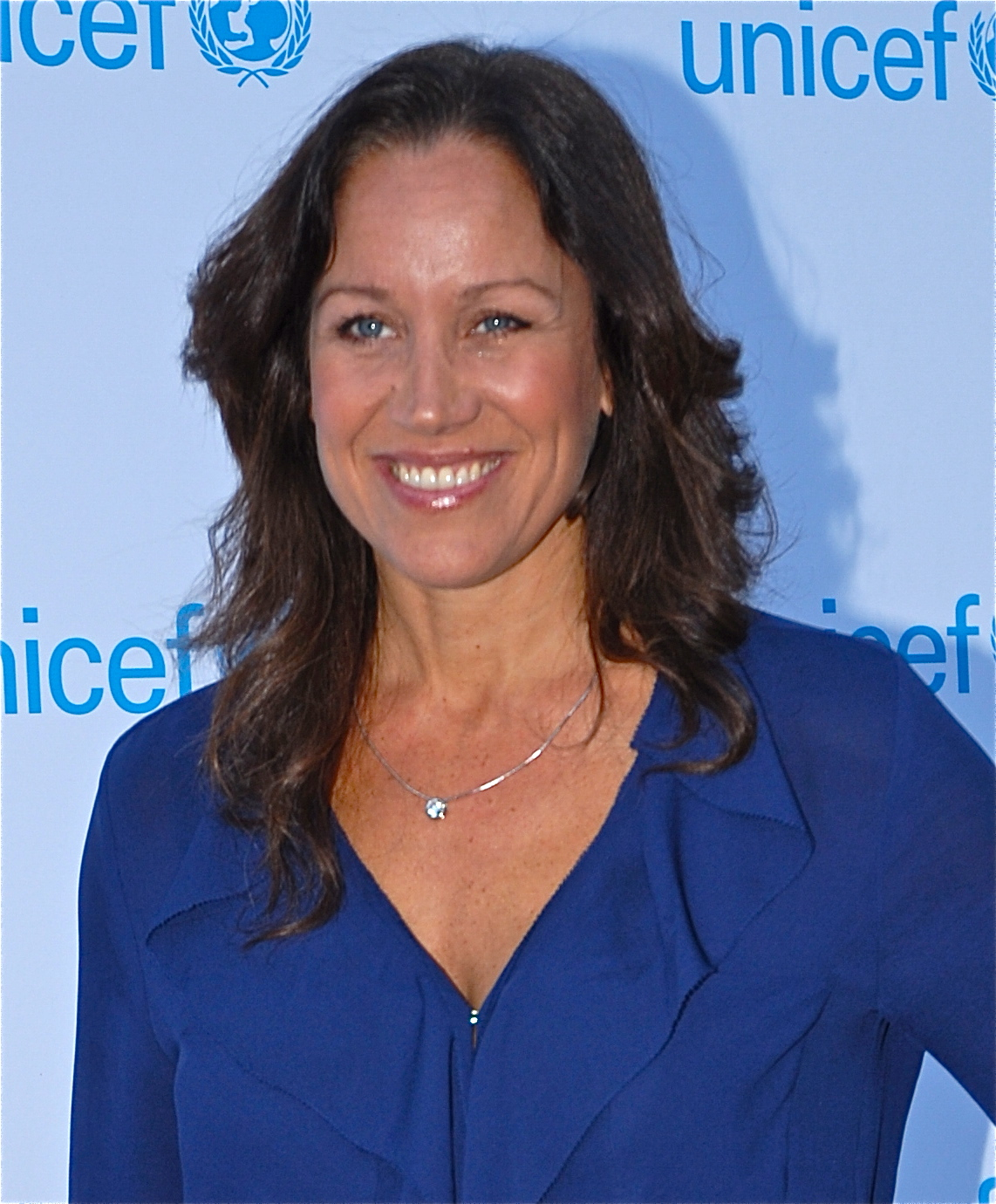 Renée Nyberg på Unicef-gala i Stockholm den 1 maj 2012.